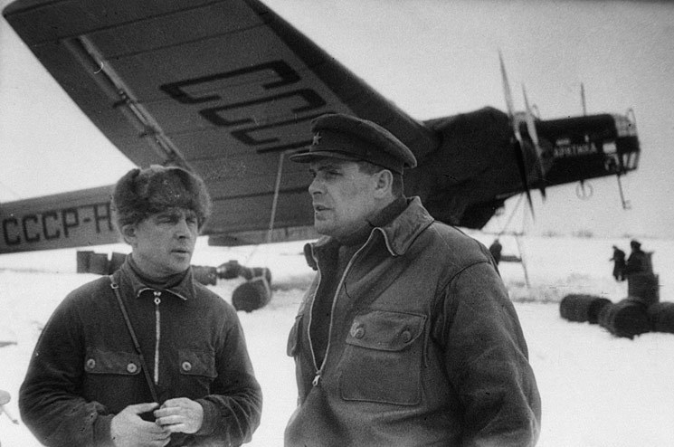 Полярный лётчик, Герой Советского Союза Михаил Васильевич Водопьянов. Довоенное фото